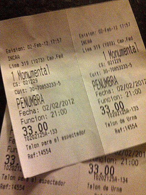 Entrada avant premiere Penumbra